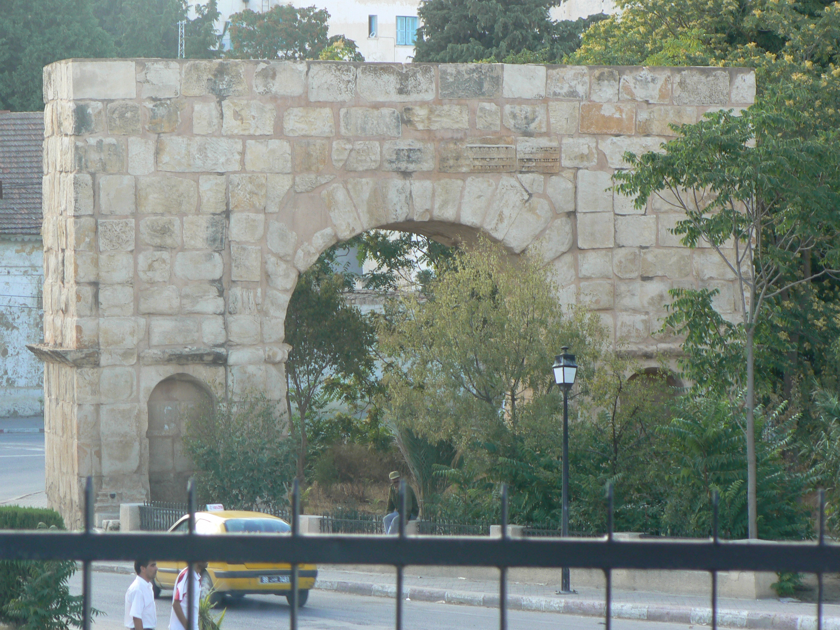 Porte dite Bal el Aïn à Makthar